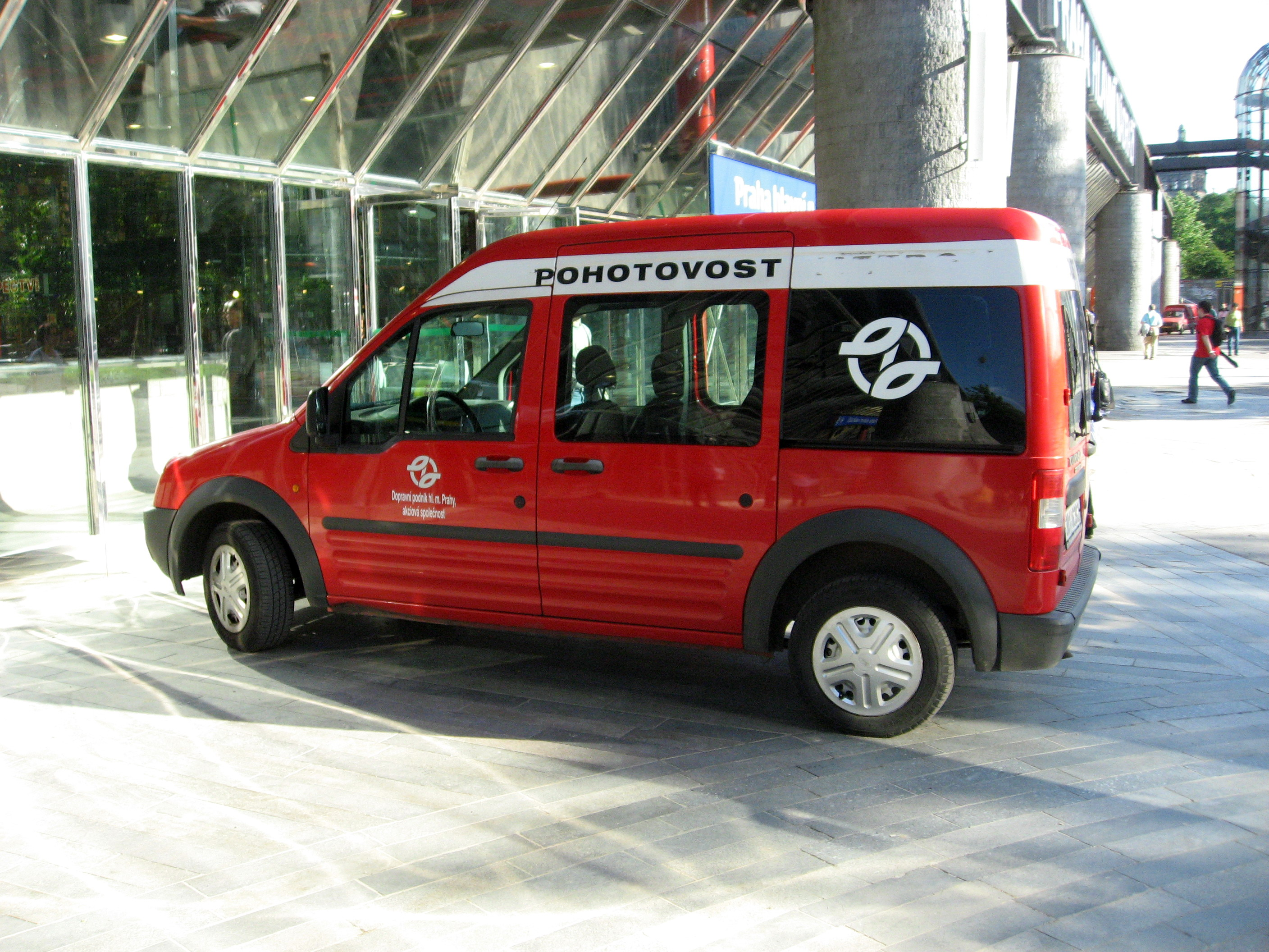 Vůz Dopravního podniku hlavního města Prahy u Hlaváku